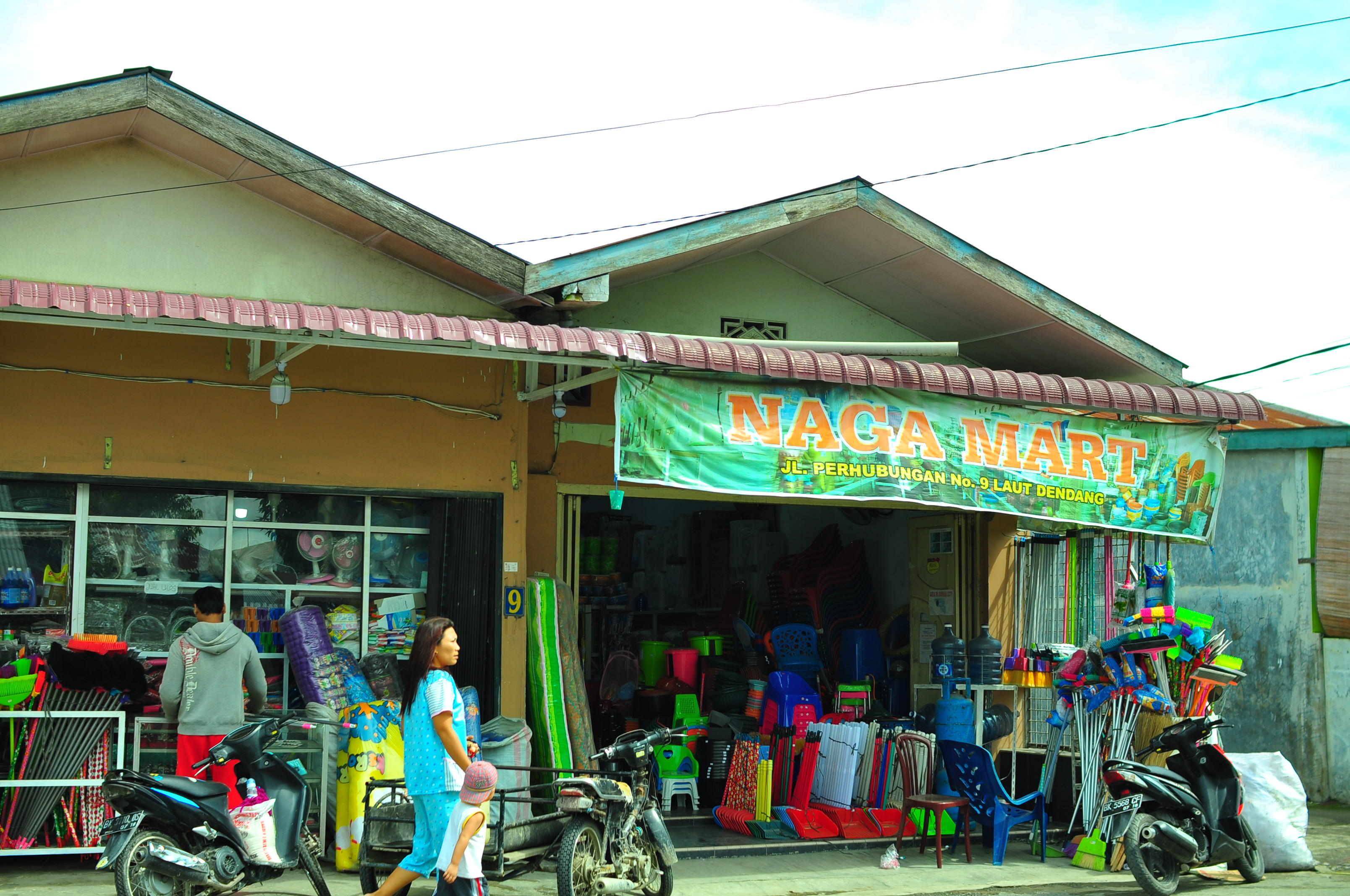 pecah belah